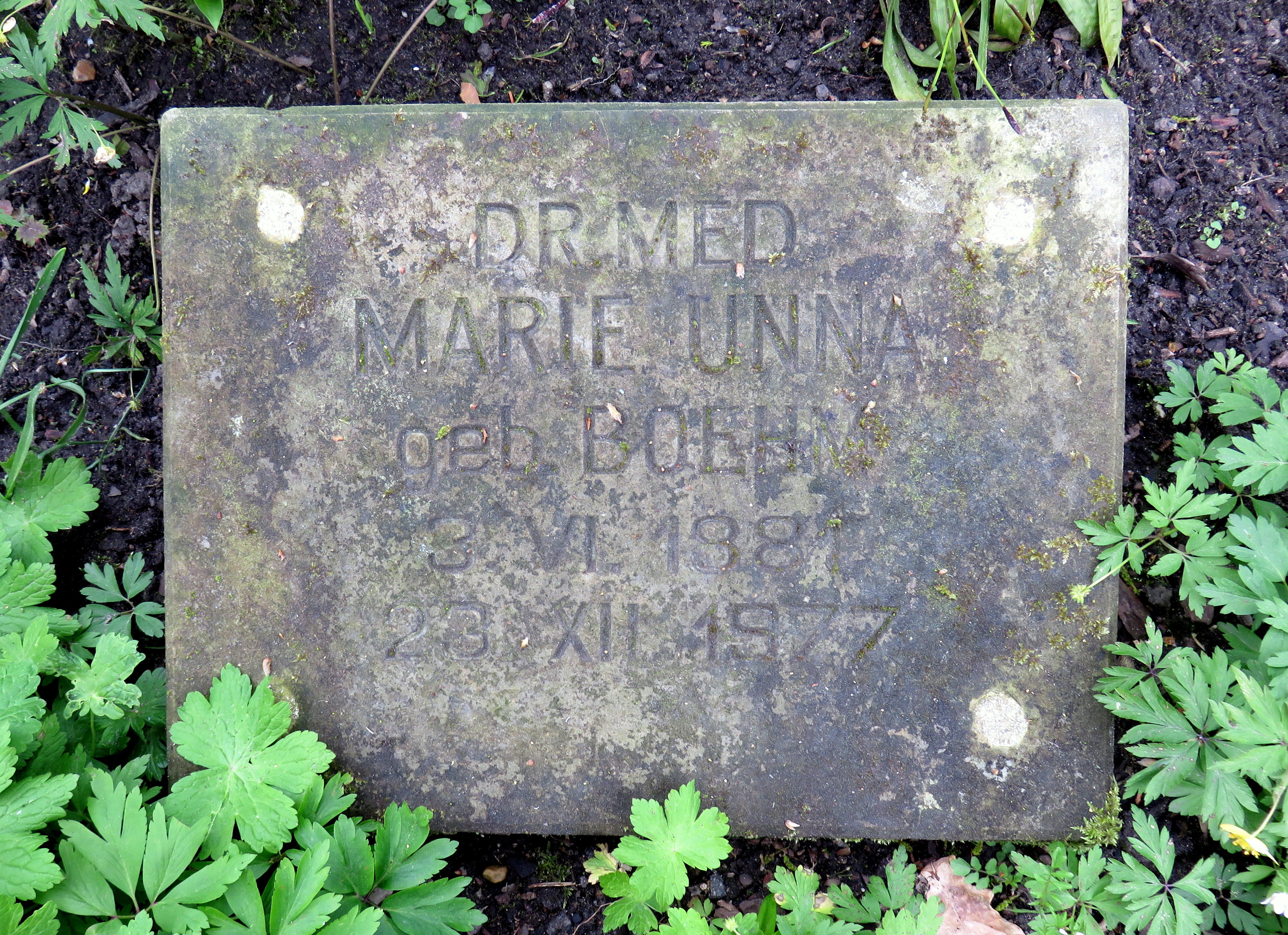 Historischer Kissenstein der deutschen Dermatologin Marie Unna im Bereich des Gartens der Frauen auf dem Ohlsdorfer Friedhof in Hamburg-Ohlsdorf.